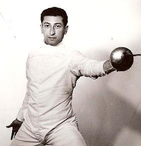 Yves Dreyfus, ancien escrimeur français.